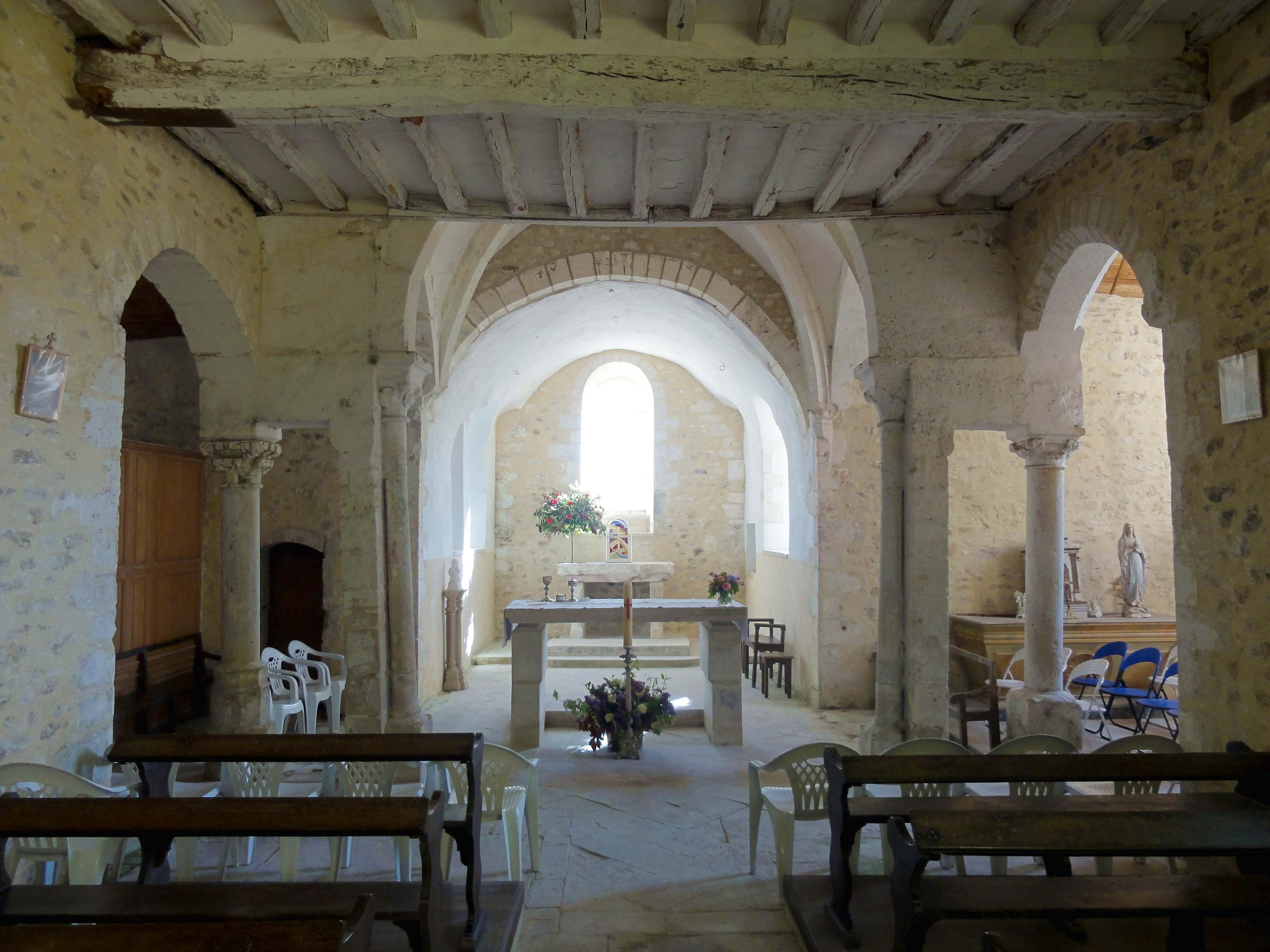 Intérieur de l'église - voir tire.